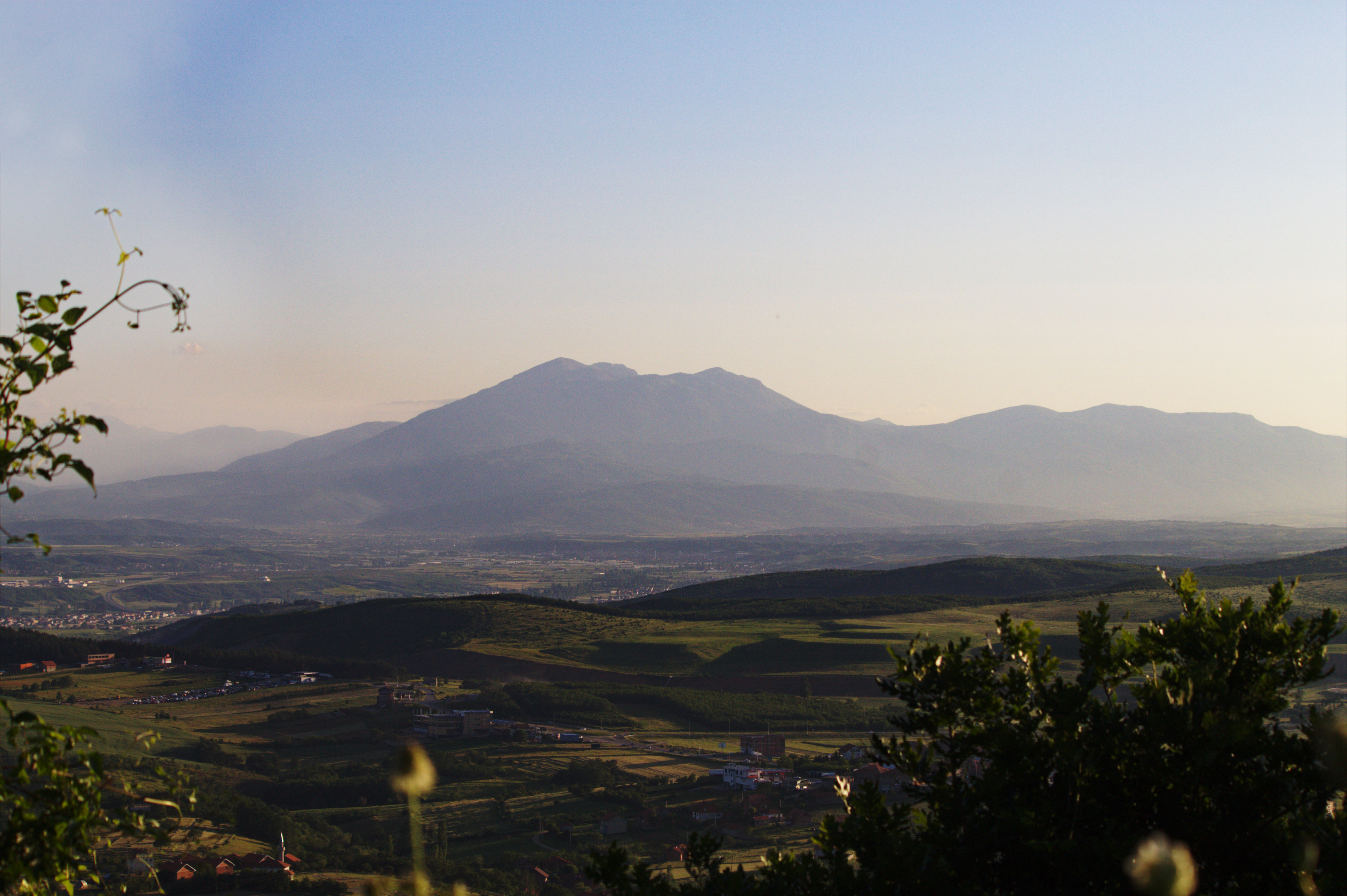 Maja e Arnenit, Prizren